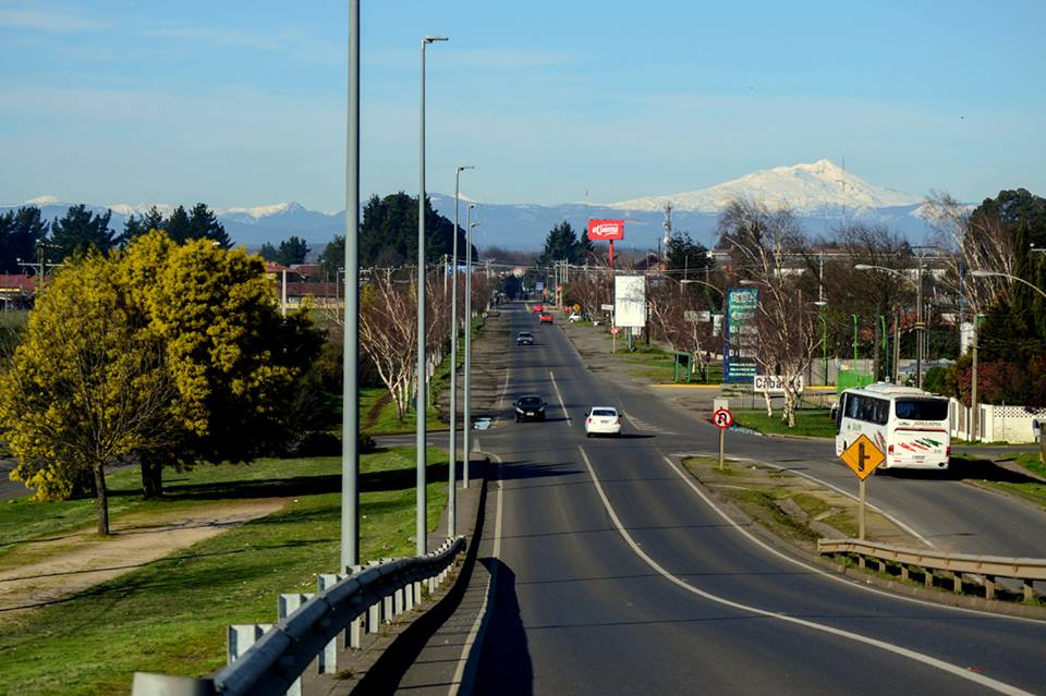 Entrada Victoria Araucania